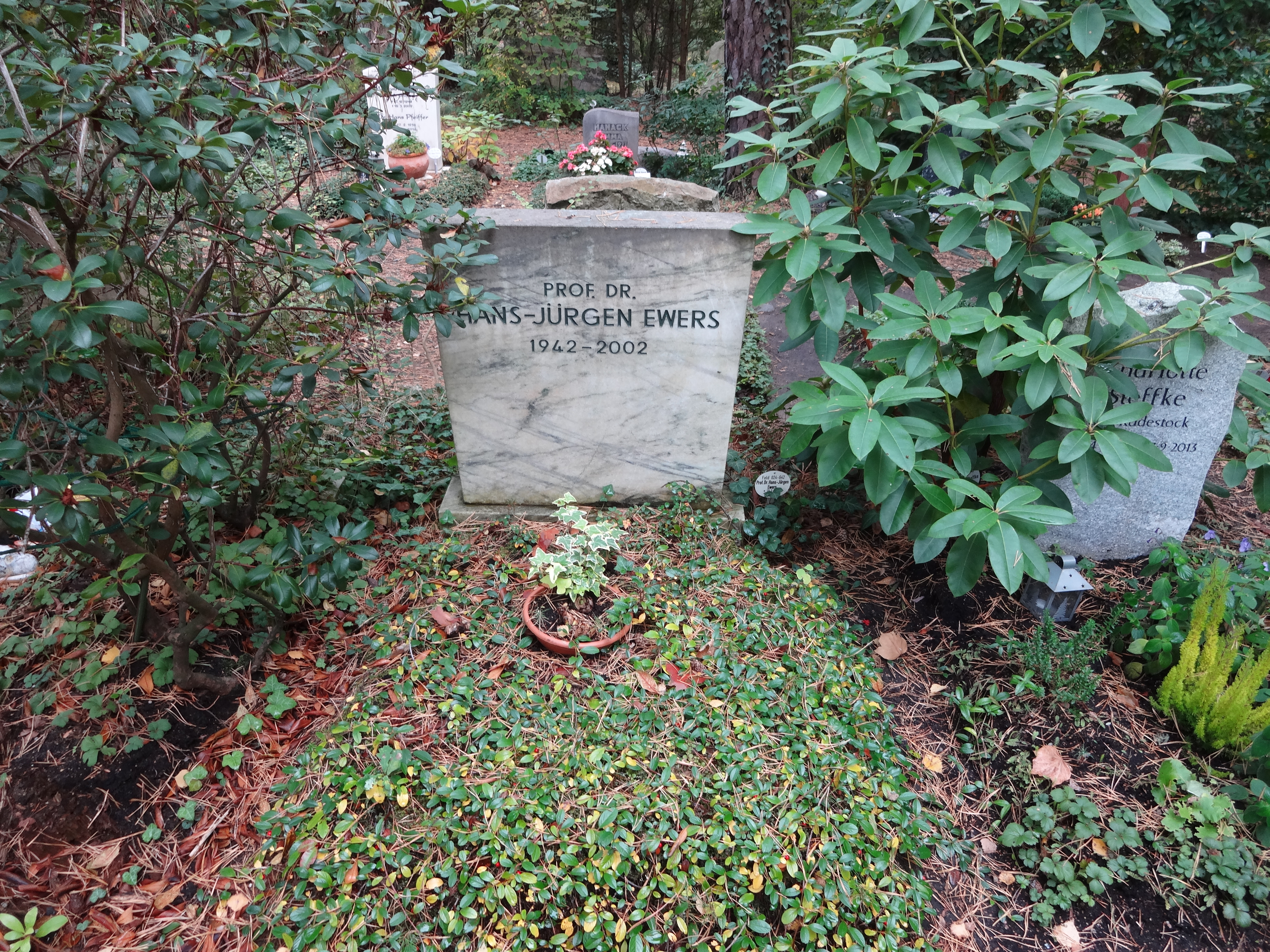 Grab von Prof. Hans-Jürgen Ewers auf dem Waldfriedhof Zehlendorf